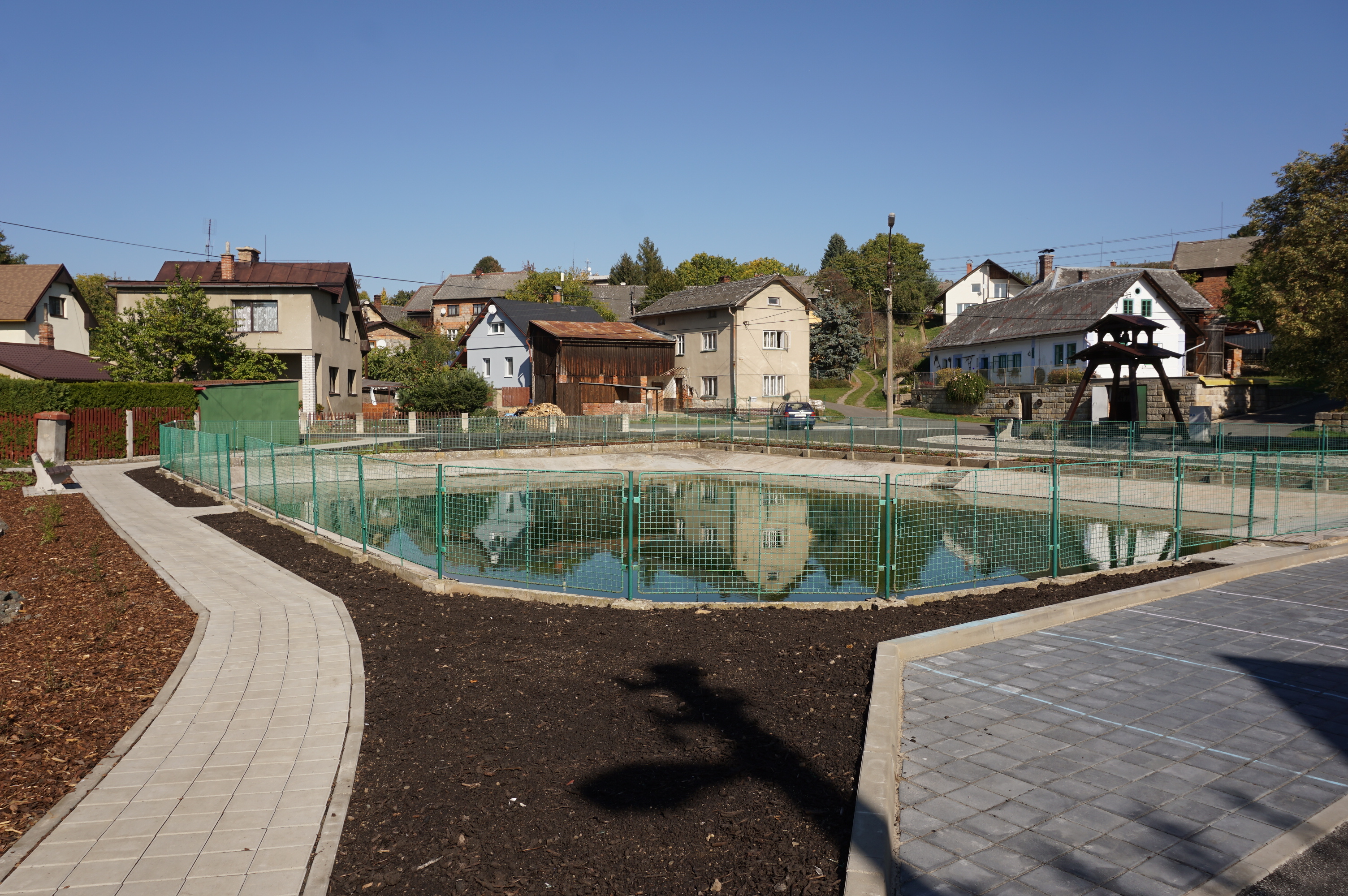 Lažany (u Turnova, okres Liberec) - náves s rybníčkem